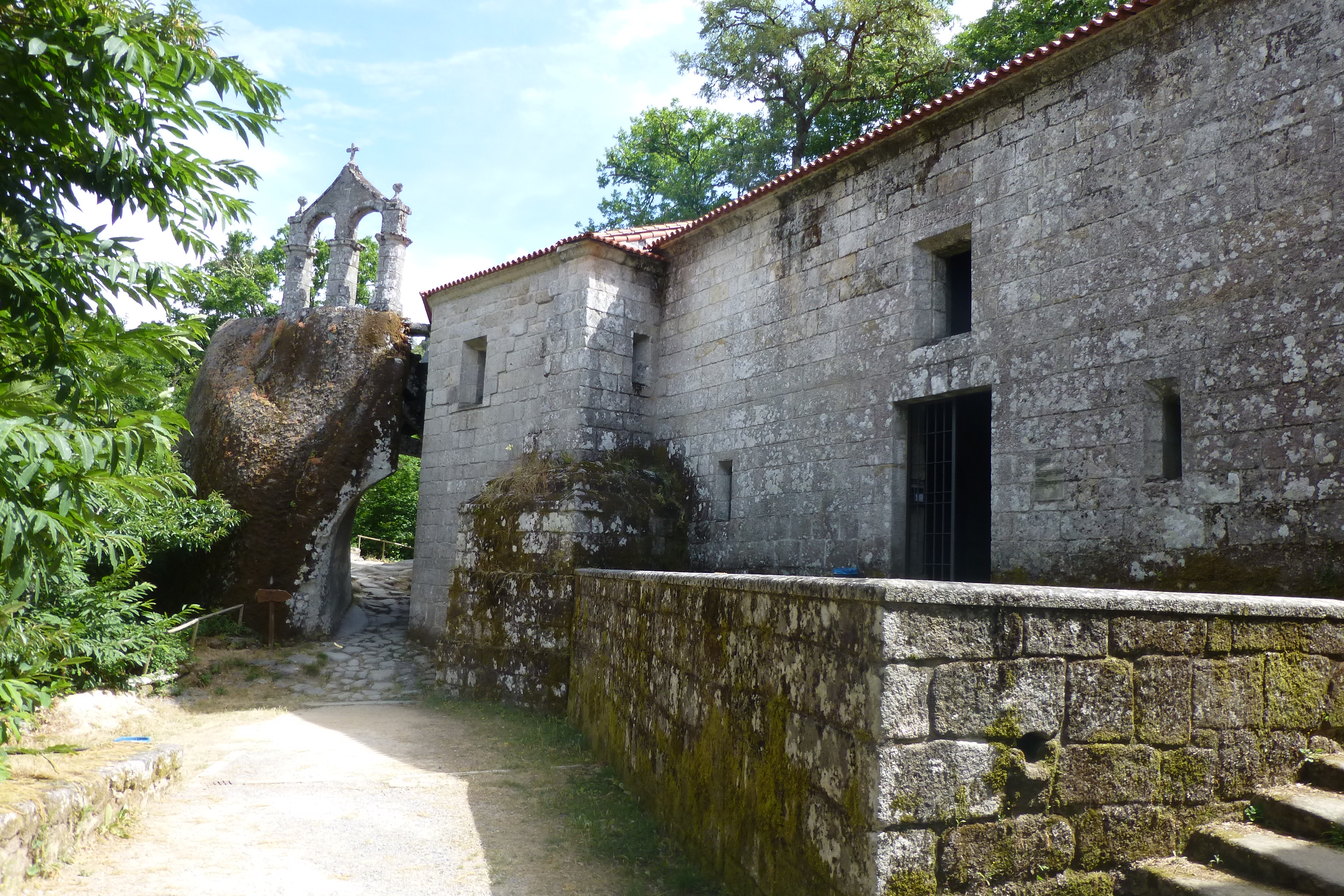 Monasterio de San Pedro de Rocas en Esgos, Ourense Galicia España.